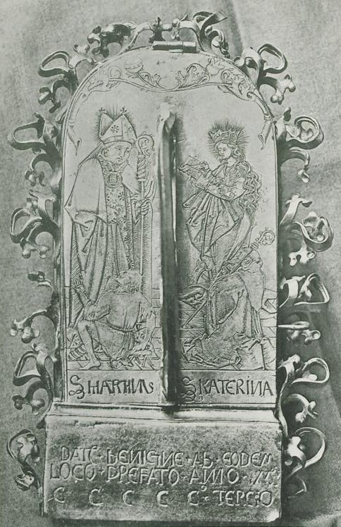 Rückseite der Eberbacher Kusstafel mit Abbildung des heiligen Martin und der heiligen Katharina